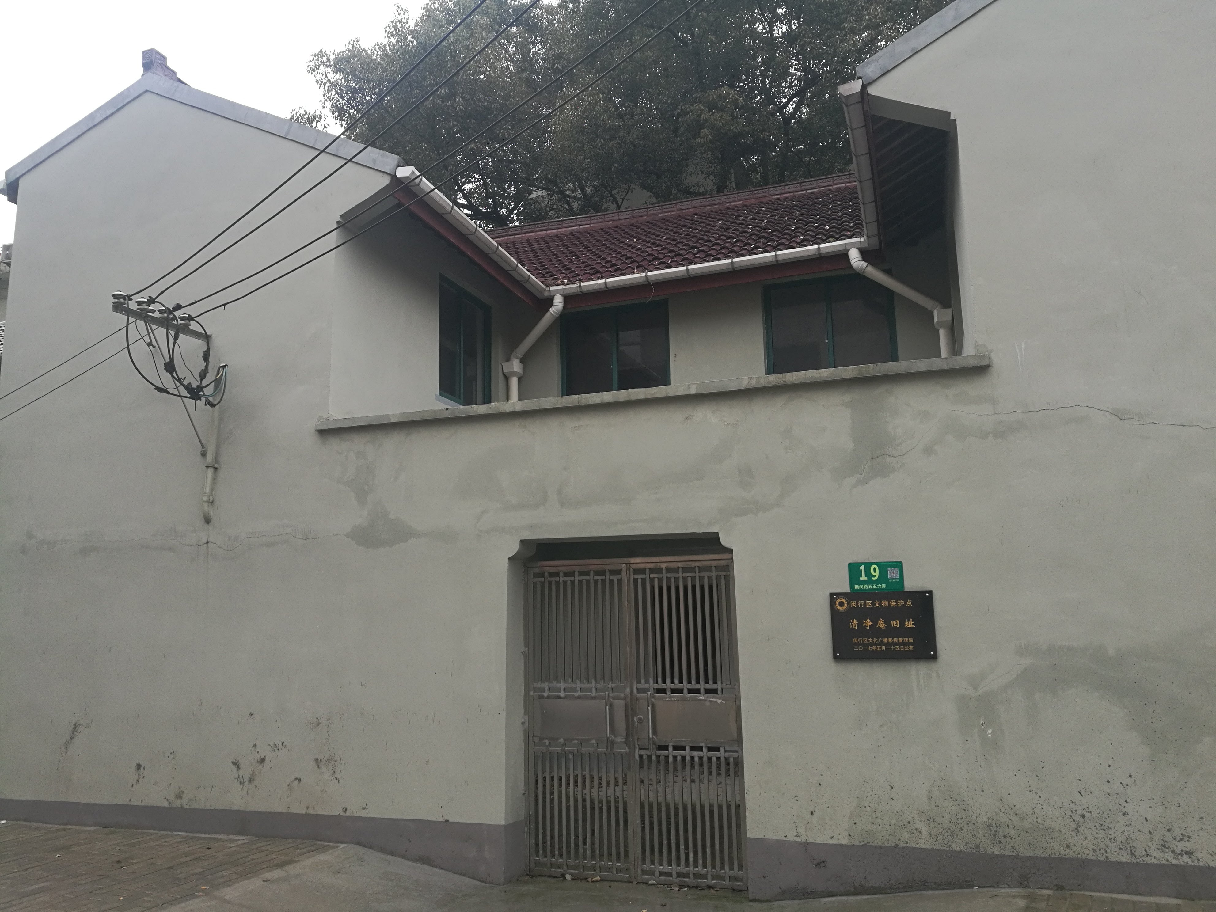 位于江川路街道的清净庵旧址